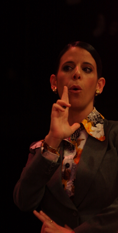 ענבל לורי ב"השנים הכי יפות"